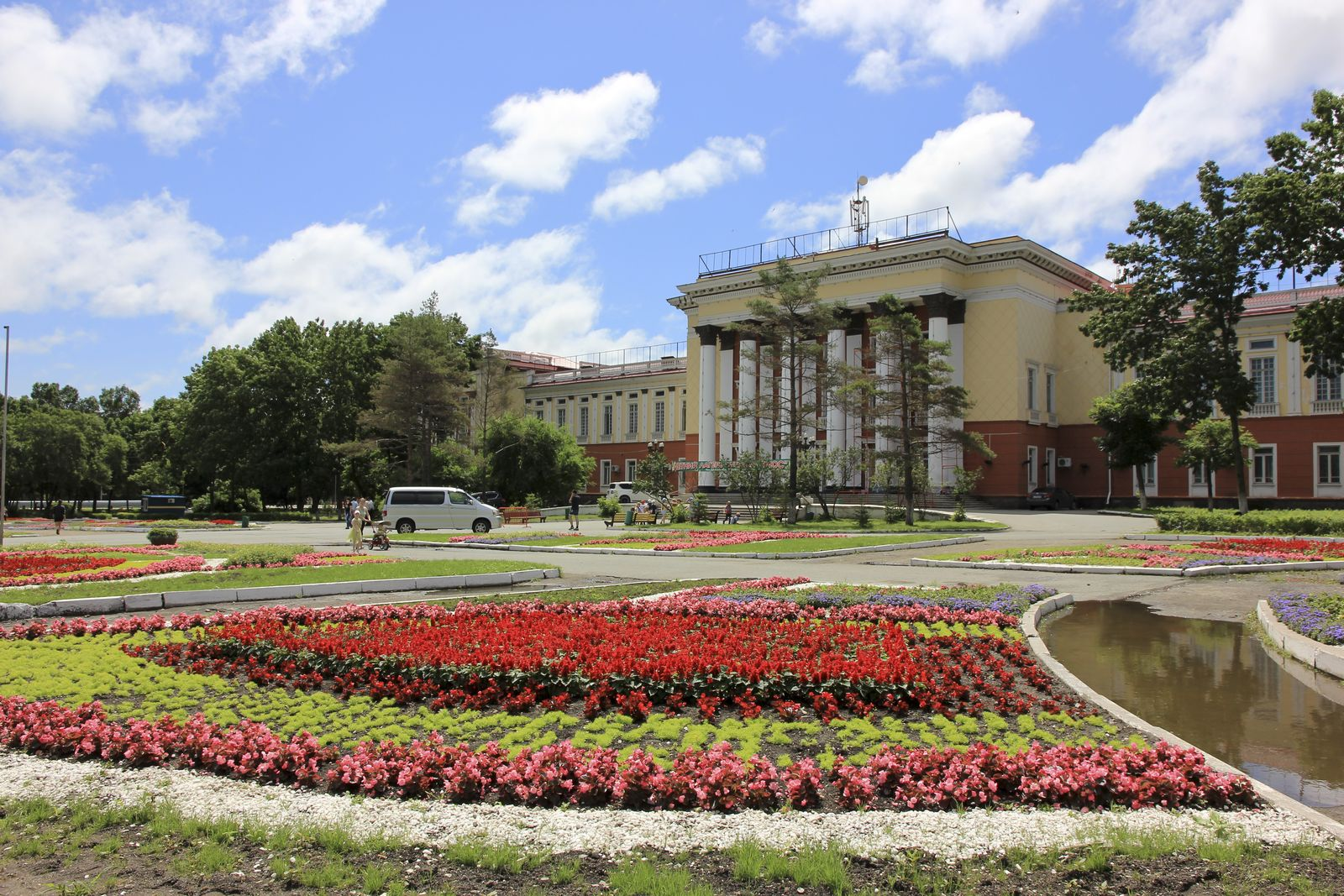 Дворец Культуры Угольщиков, г.Артем, Приморский край, Россиия